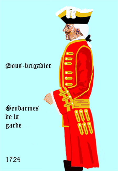 Uniform der Gendarmes de la garde um 1724